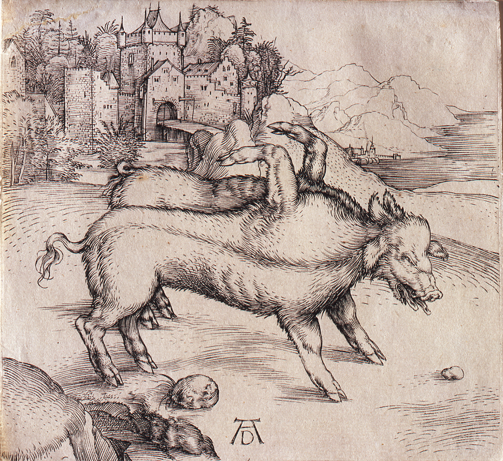 Die wunderbare Sau von Landser